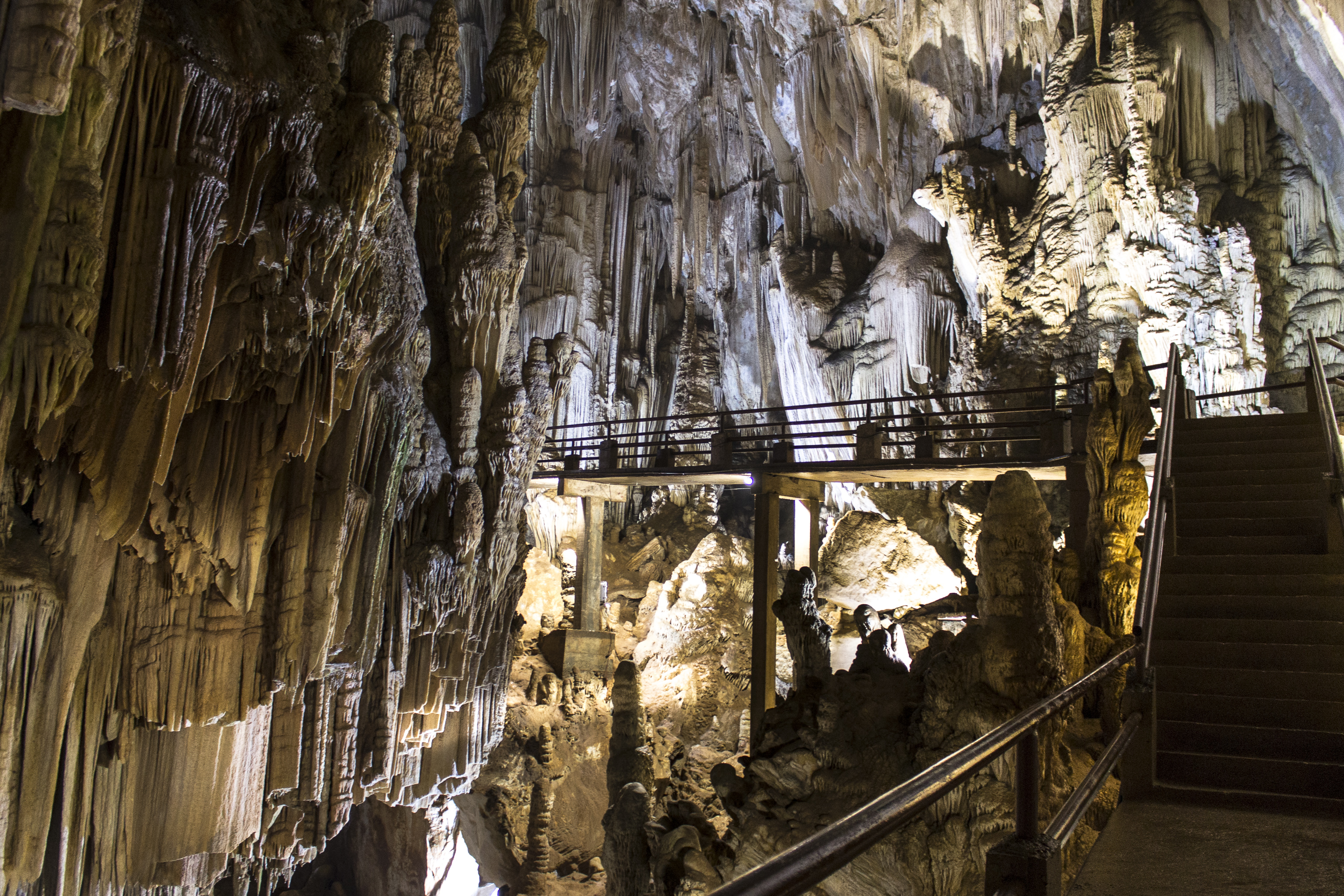 Devido a grandiosidade dos salões, a grande passarela se apresenta de forma tímida, mas não deixa de compor a maravilhosa paisagem.